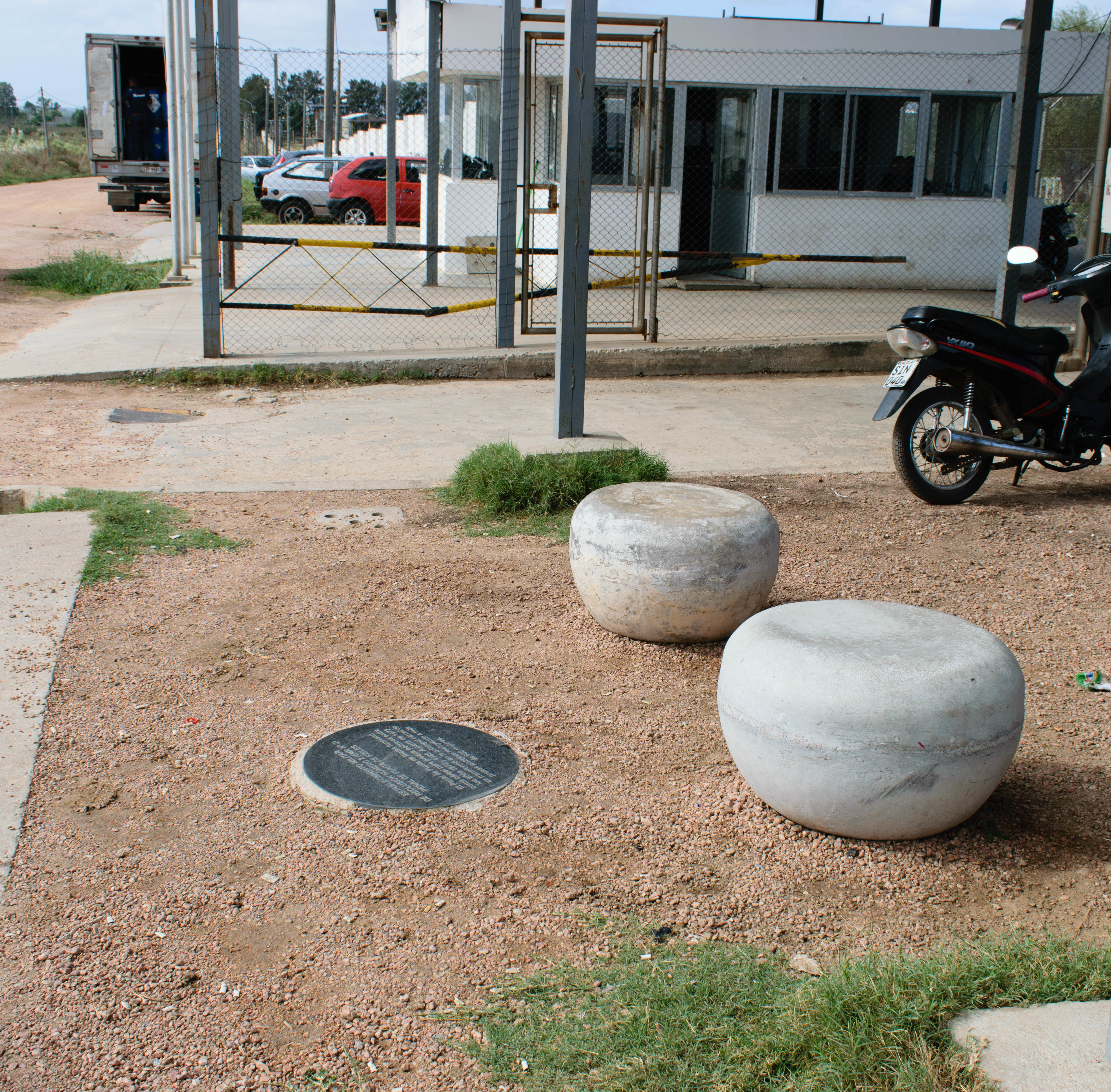 Integra el proyecto Marcas de la Memoria